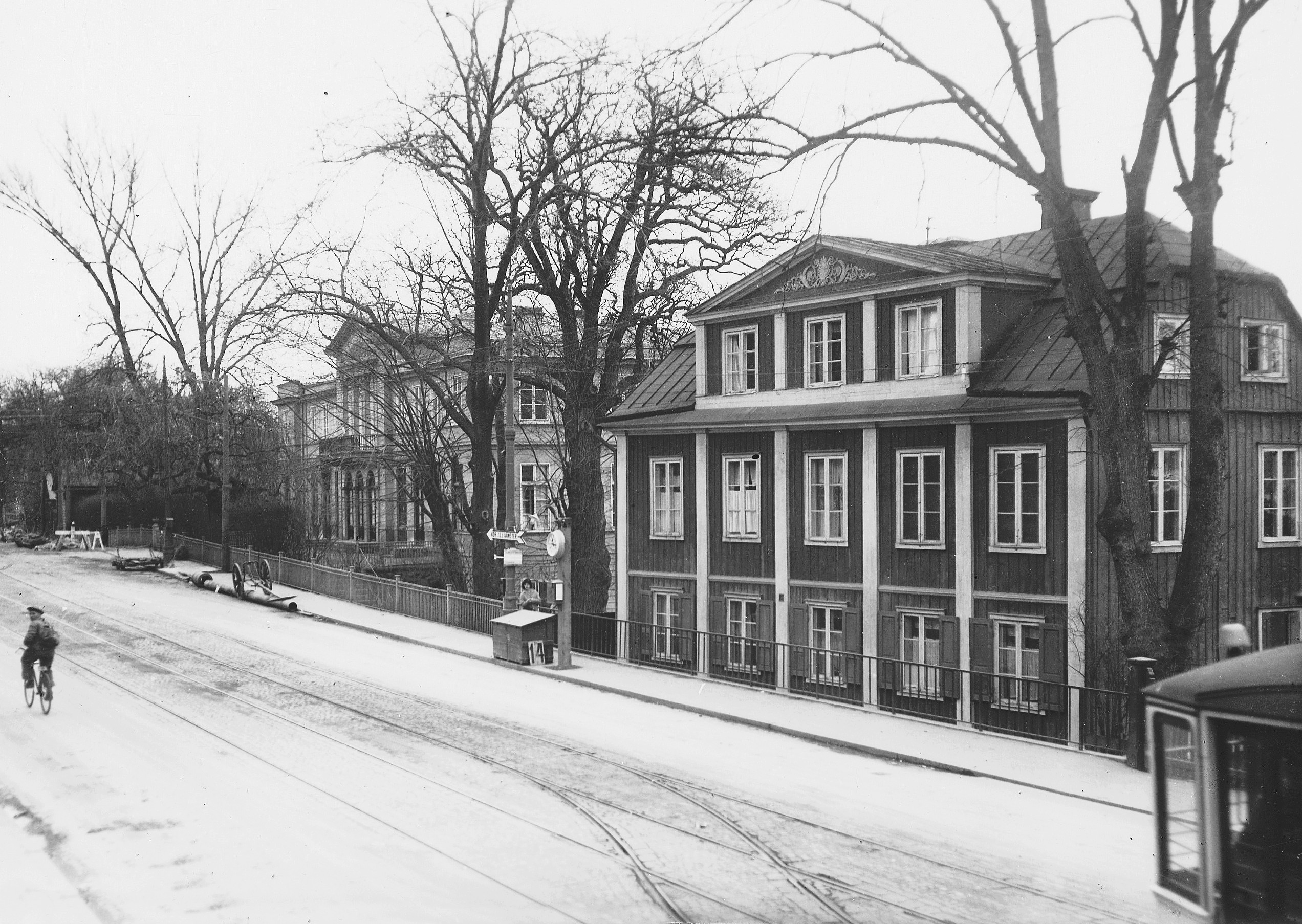 Djurgårdsvägen 144 med "Lilla Berga", f.d. Alberget 5A (närmast) och "Weylands villa"